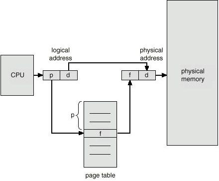 Монгол: хуудаслалт